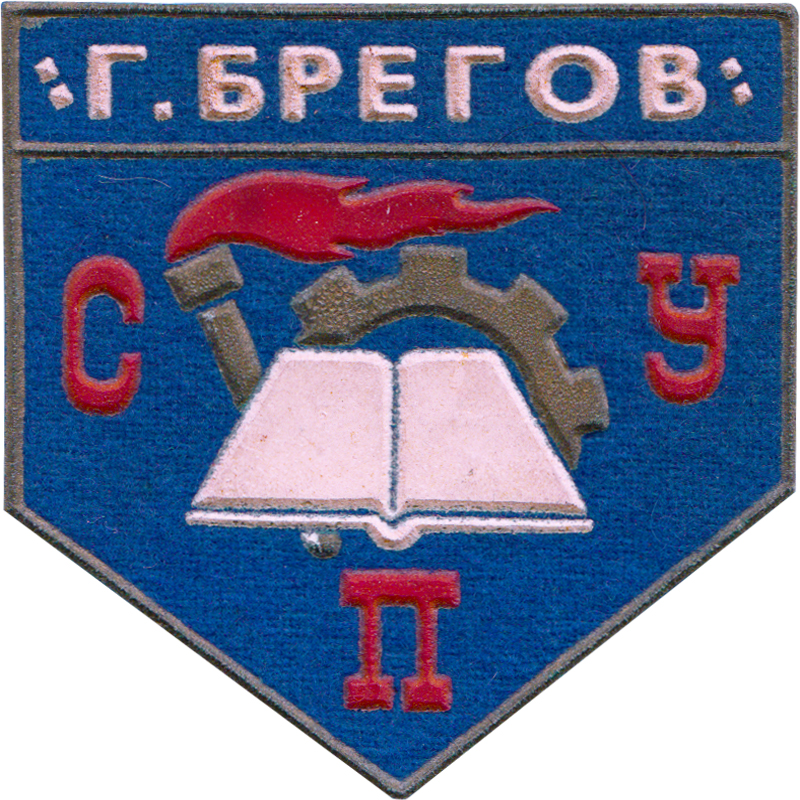 Емблема за ученическа униформа на ЕСПУ (тогава) „Георги Брегов“, 80-те години на XXв